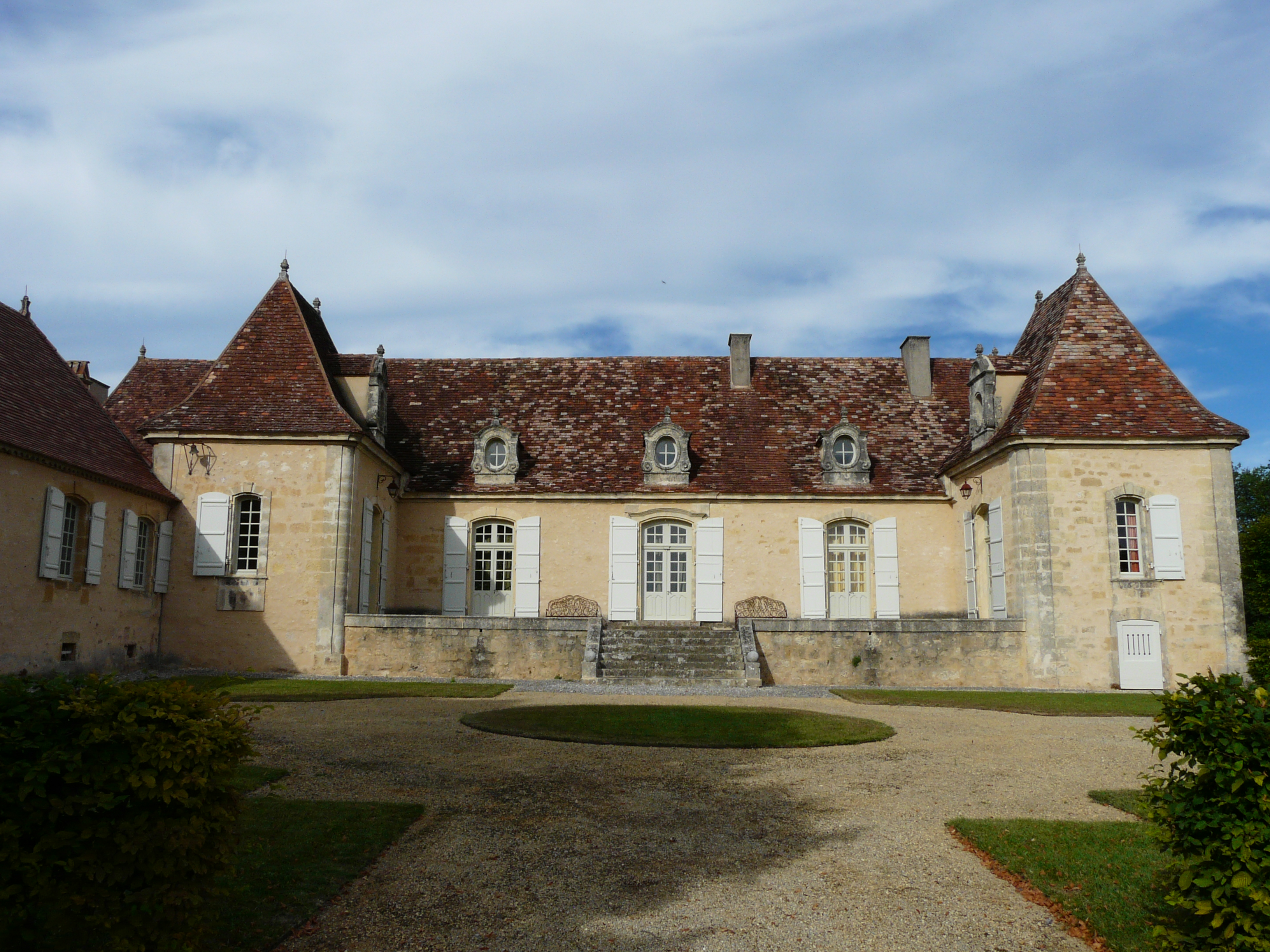 La façade sud-ouest du manoir de Sautet, Molères, Dordogne, France.